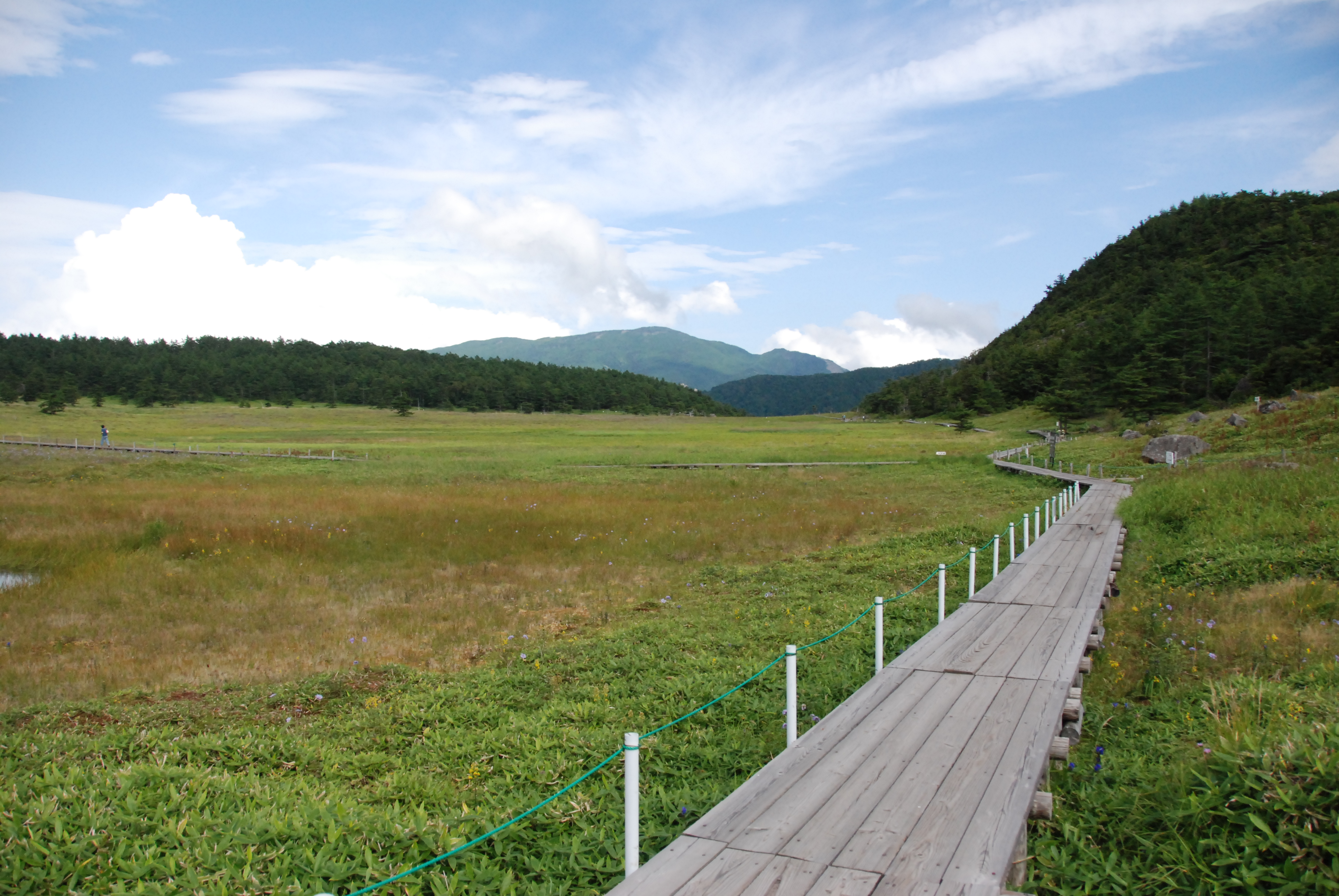 a moor at Ikenotaira takamine-kogen